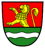 Wappen der Stadt Laatzen